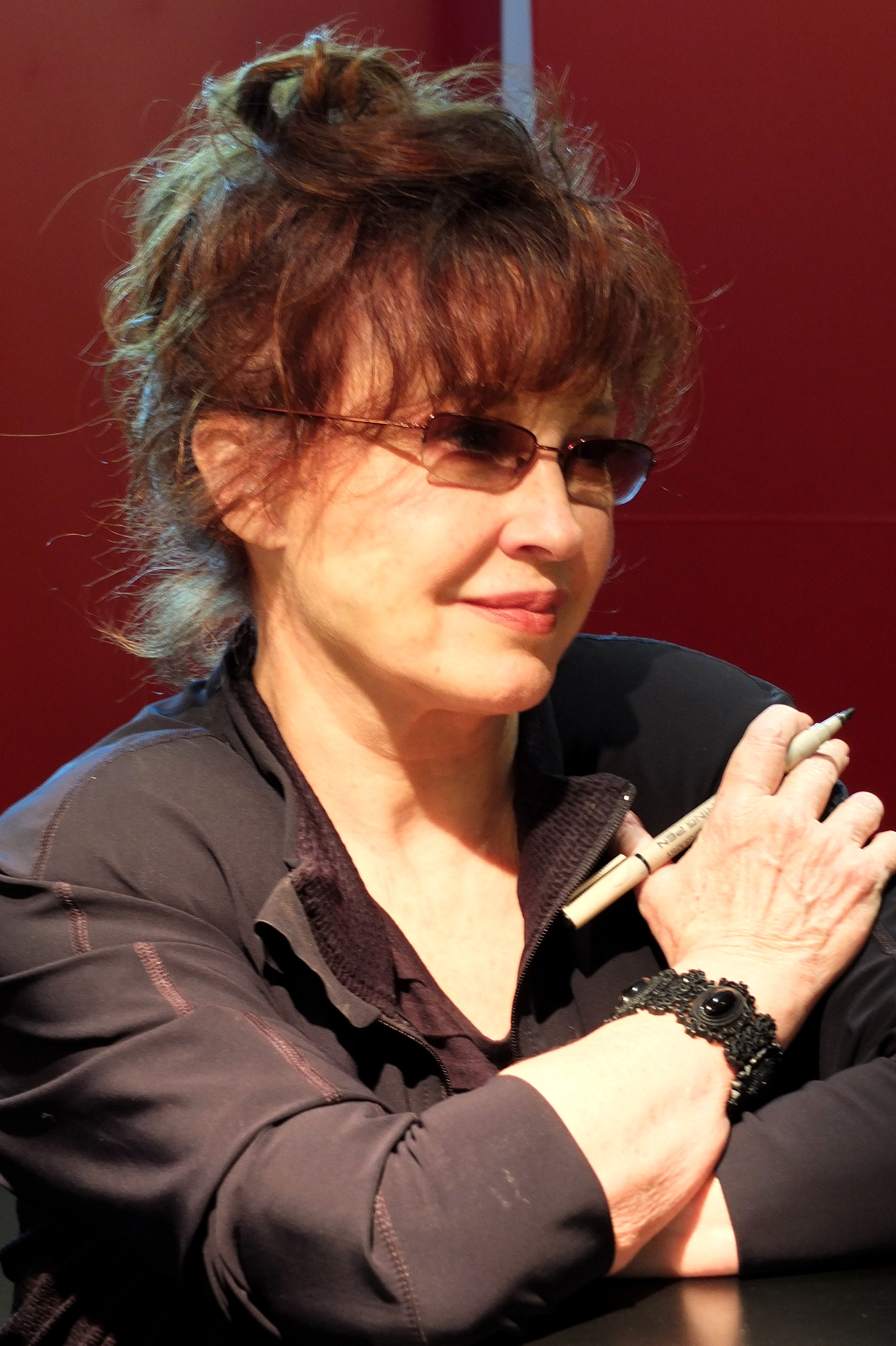 Marlène Jobert lors de la présentation de son livre Les bisous du croqu'Odile à la FNAC des Ternes, Paris (17e arrond.).